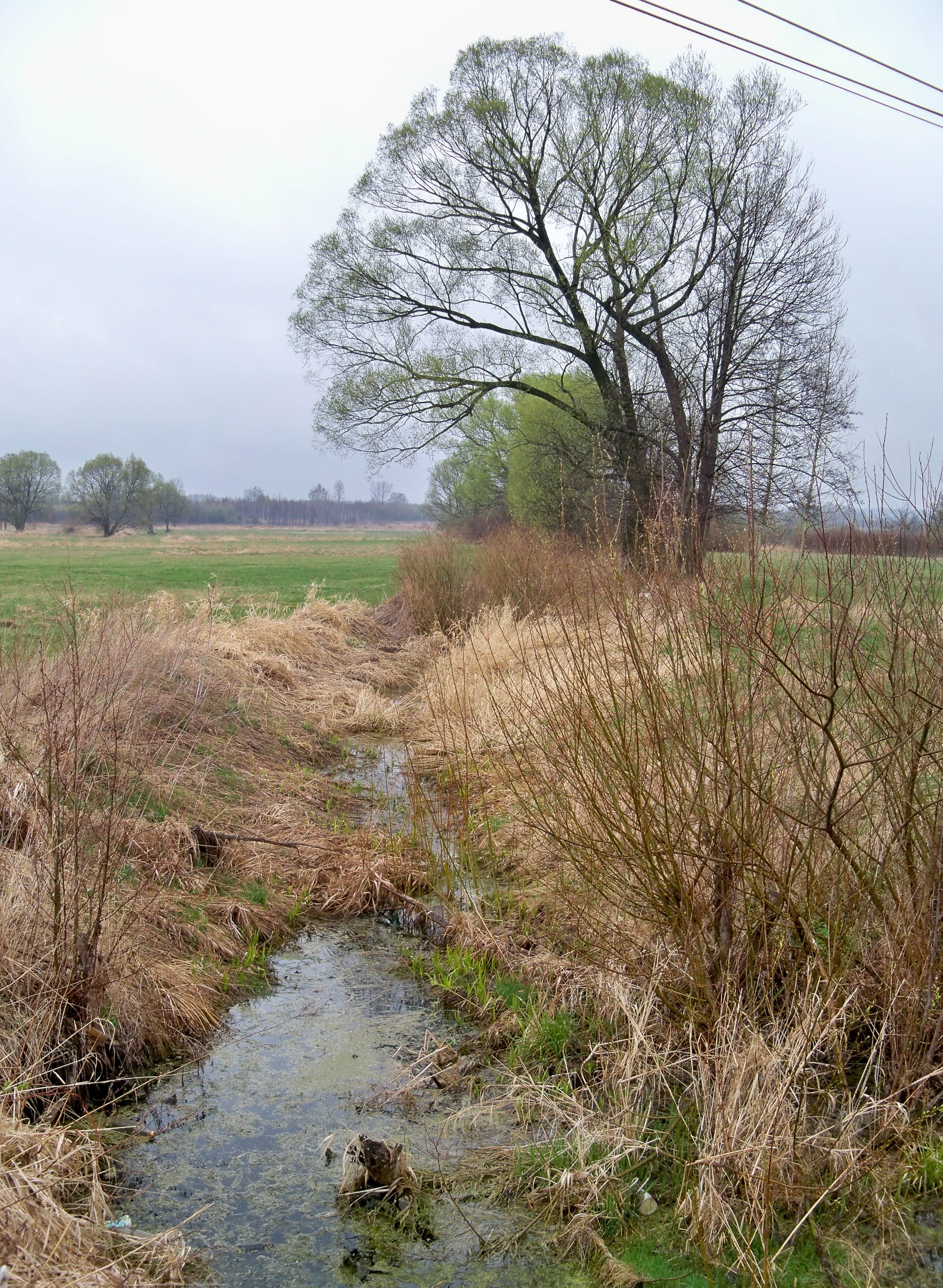 Stara Trzebośnica – dawne, nieuregulowane koryto, obecnie starorzecze. Trzeboś.